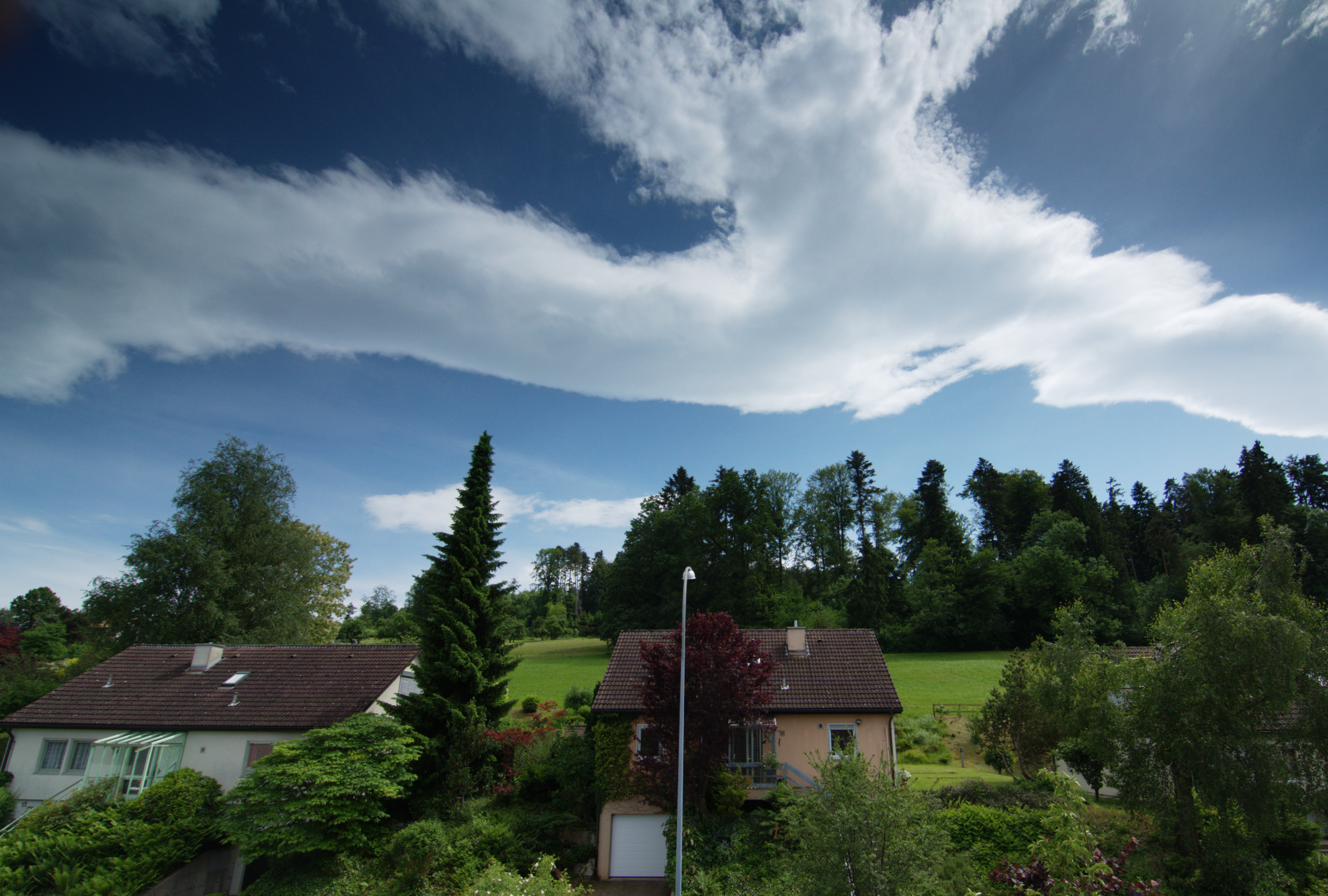 Föhnwolken in der Schweiz, in der Nähe von Wil. Der Föhn war den ganzen Tag über stark spürbar und hat frisch gewachsene Holunderzweige bleibend umgedrückt.